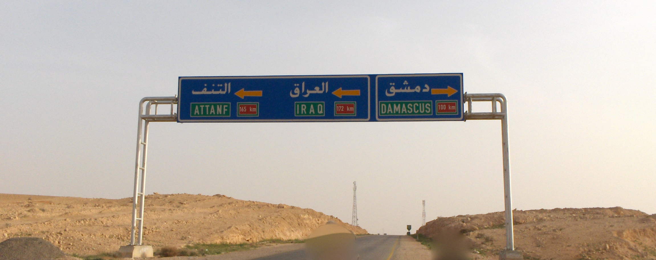 Bivio per Damasco pochi chilometri dopo il Bagdad Cafe, sulla Palmira - Damasco